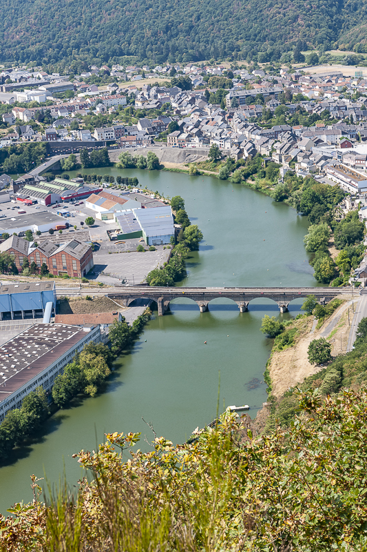 Revin est traversée par les méandres de la Meuse